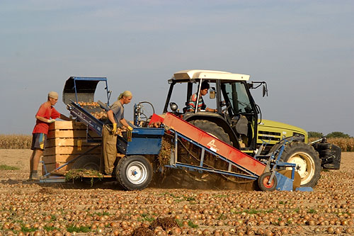 Zwiebelernte bei Möhlin (Kanton Aargau) am 16. September 2003; Hürlimann-Traktor